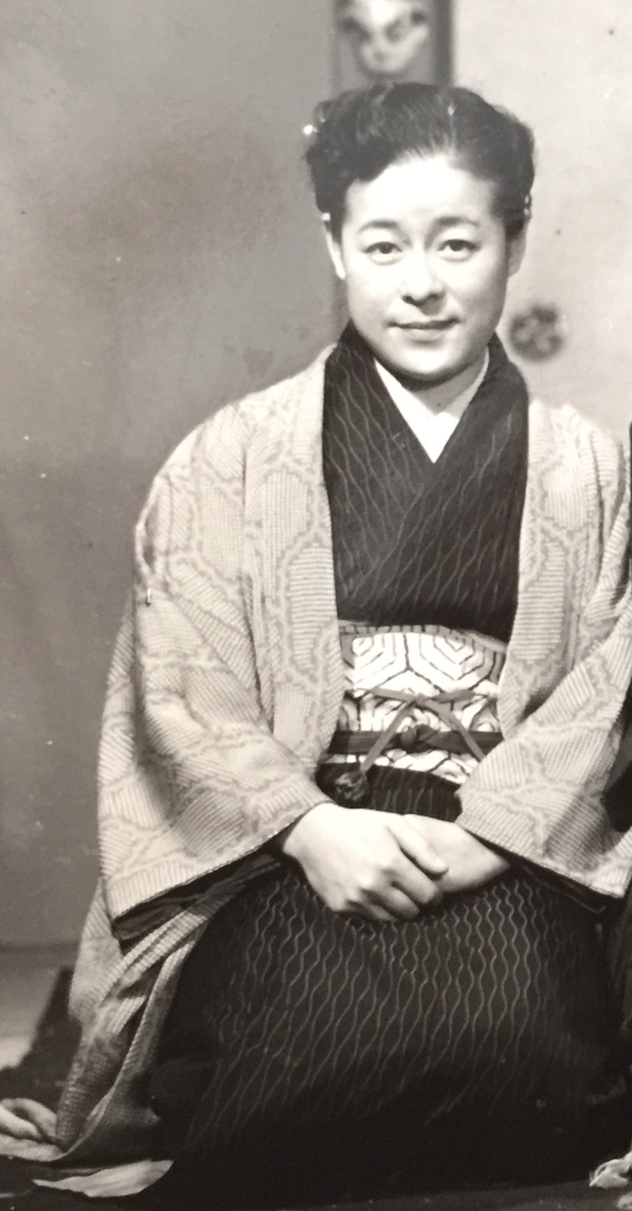 東宝女優 白鳩真弓 昭和 映画撮影画像